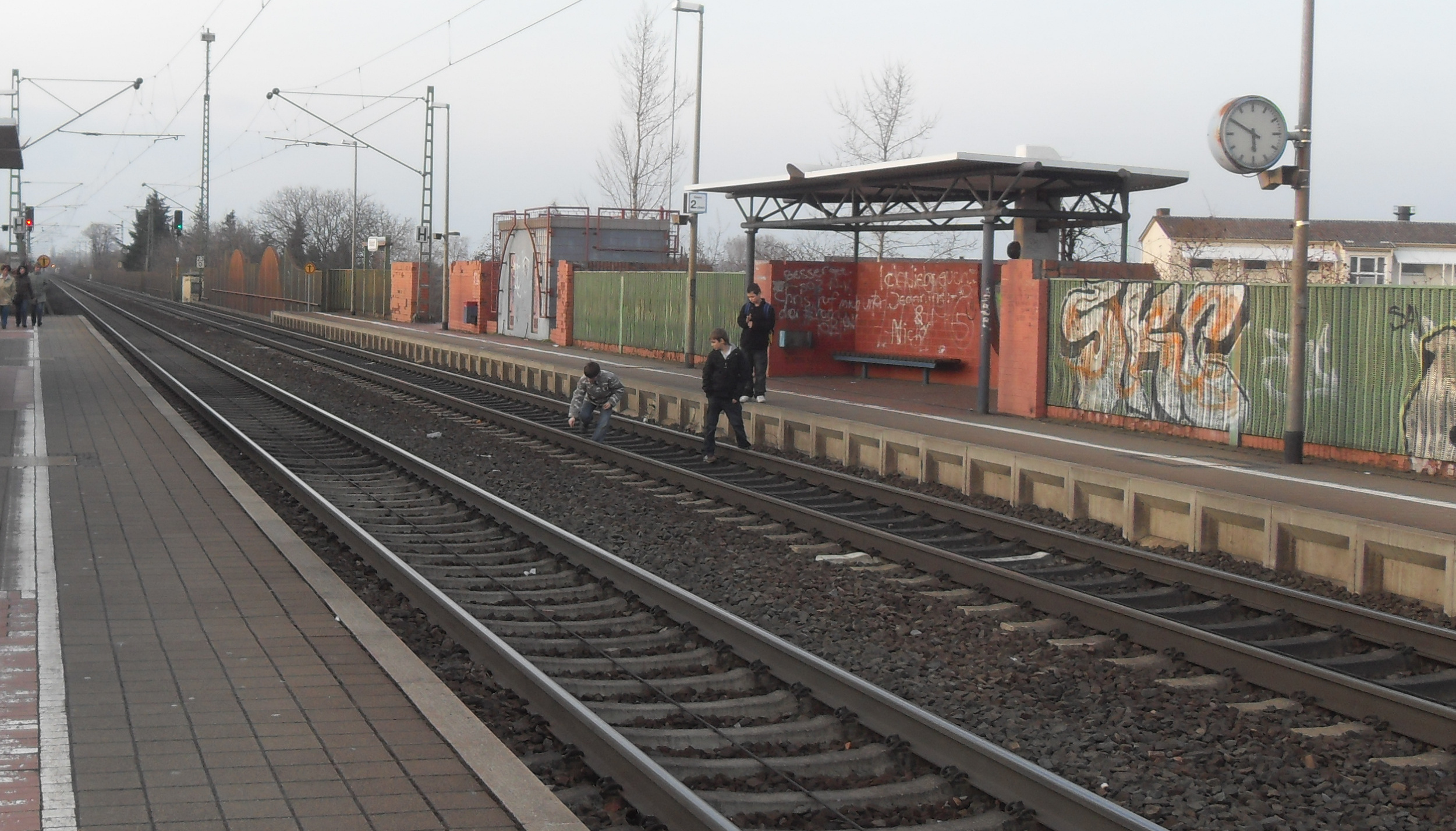 Spielende Kinder auf der Riedbahn bei einem „Fahrt“ zeigenden Signal im Bahnhof Bürstadt auf dem Gleis Richtung Frankfurt am Main